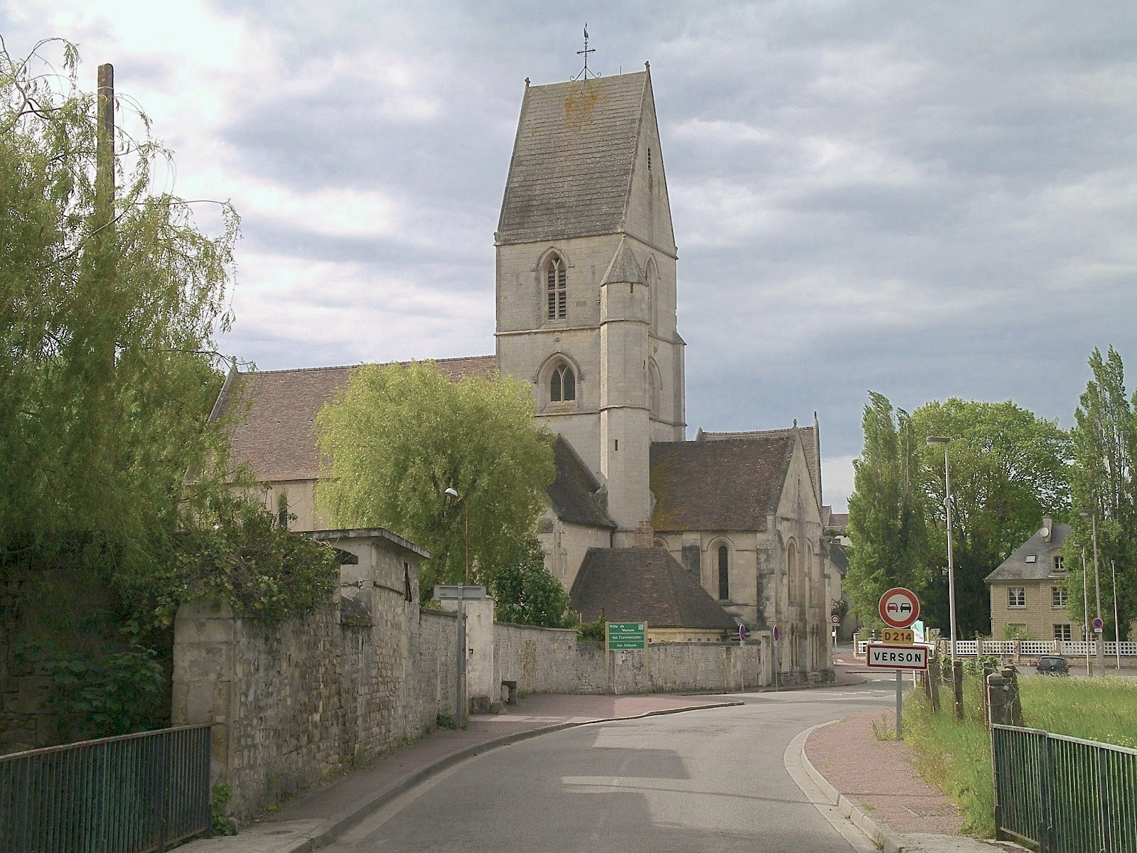 Eglise Saint-Germain à Verson (Calvados)